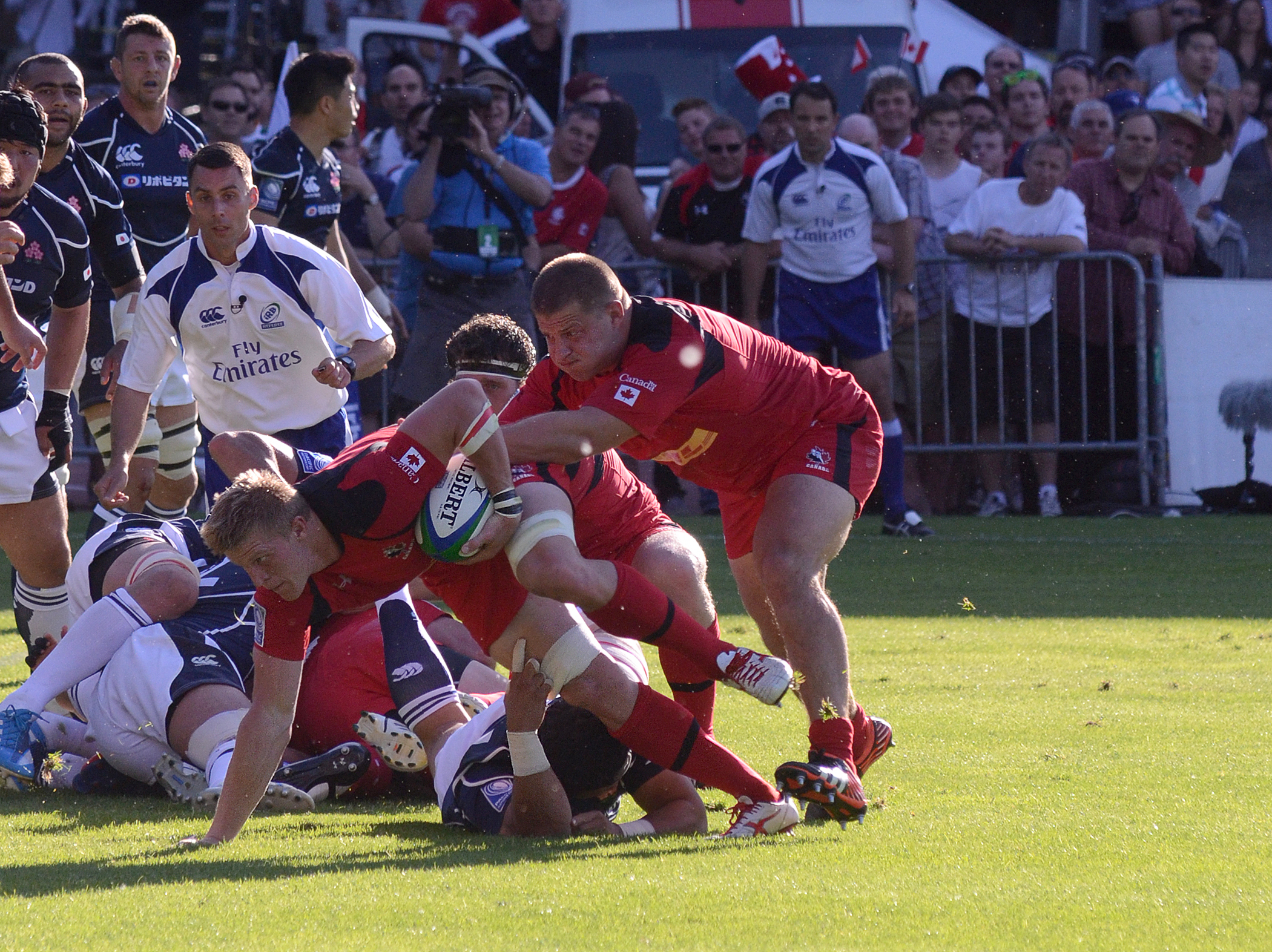 Canada VS Japan rugby